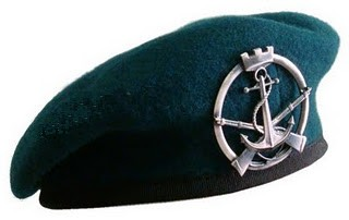 Basco in uso ai Lagunari dell'Esercito italiano. Precedentemente di colore nero (fregio invariato) in uso da Marzo 2011